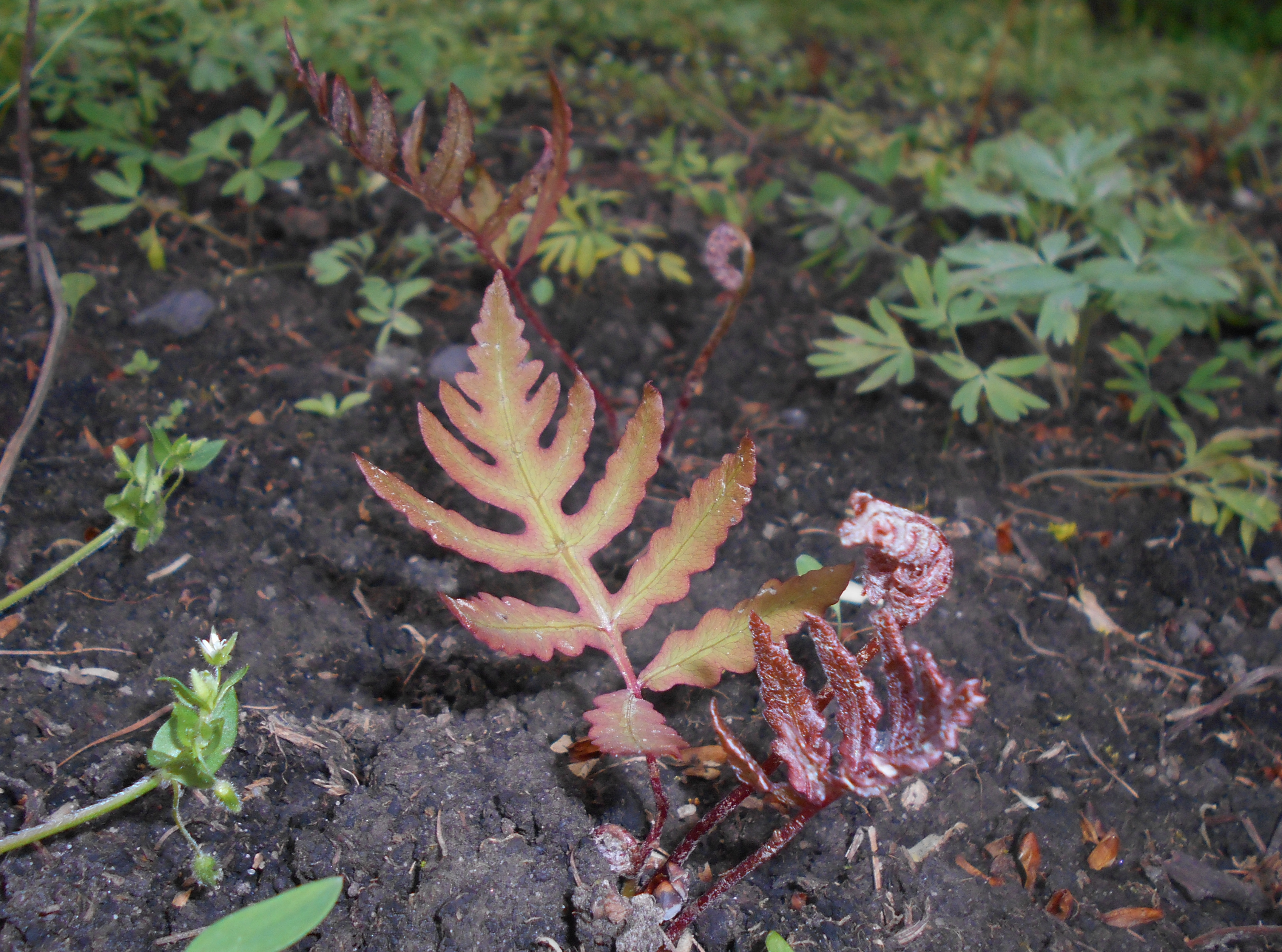 Onoklea wrażliwa (Onoclea sensibilis), Ogród Botaniczny UMCS w Lublinie